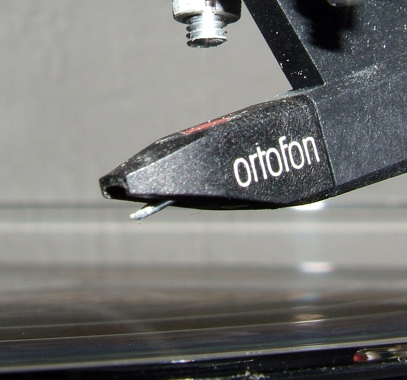 Ortofon OM30 on Kenwood KD 770-B